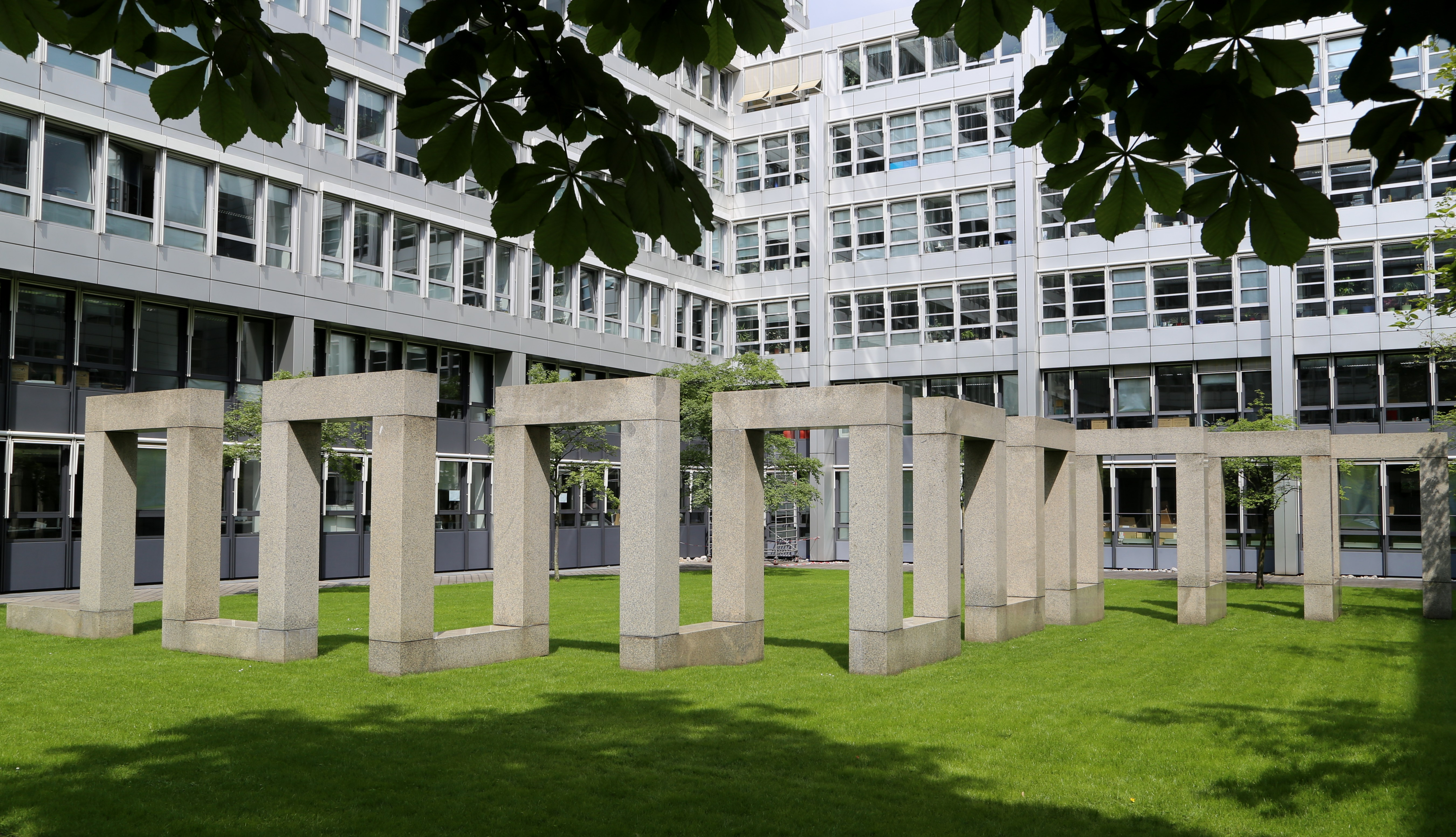 Max Bill: Rhythmus im Raum (1994), Europäisches Patentamt, Bayerstraße, München